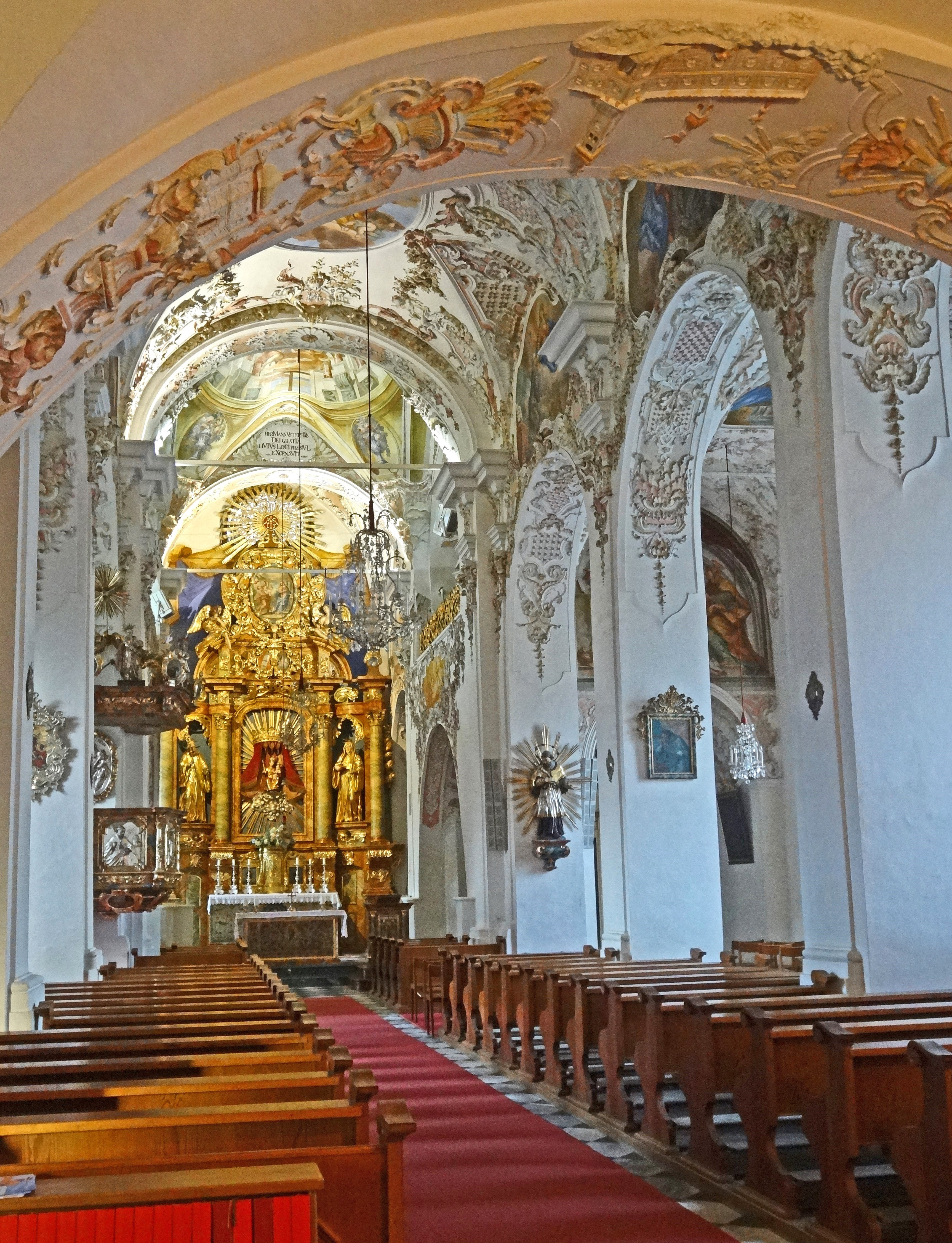 Ehem. Benediktinerstift Ossiach, Innenansicht gegen den Hochaltar